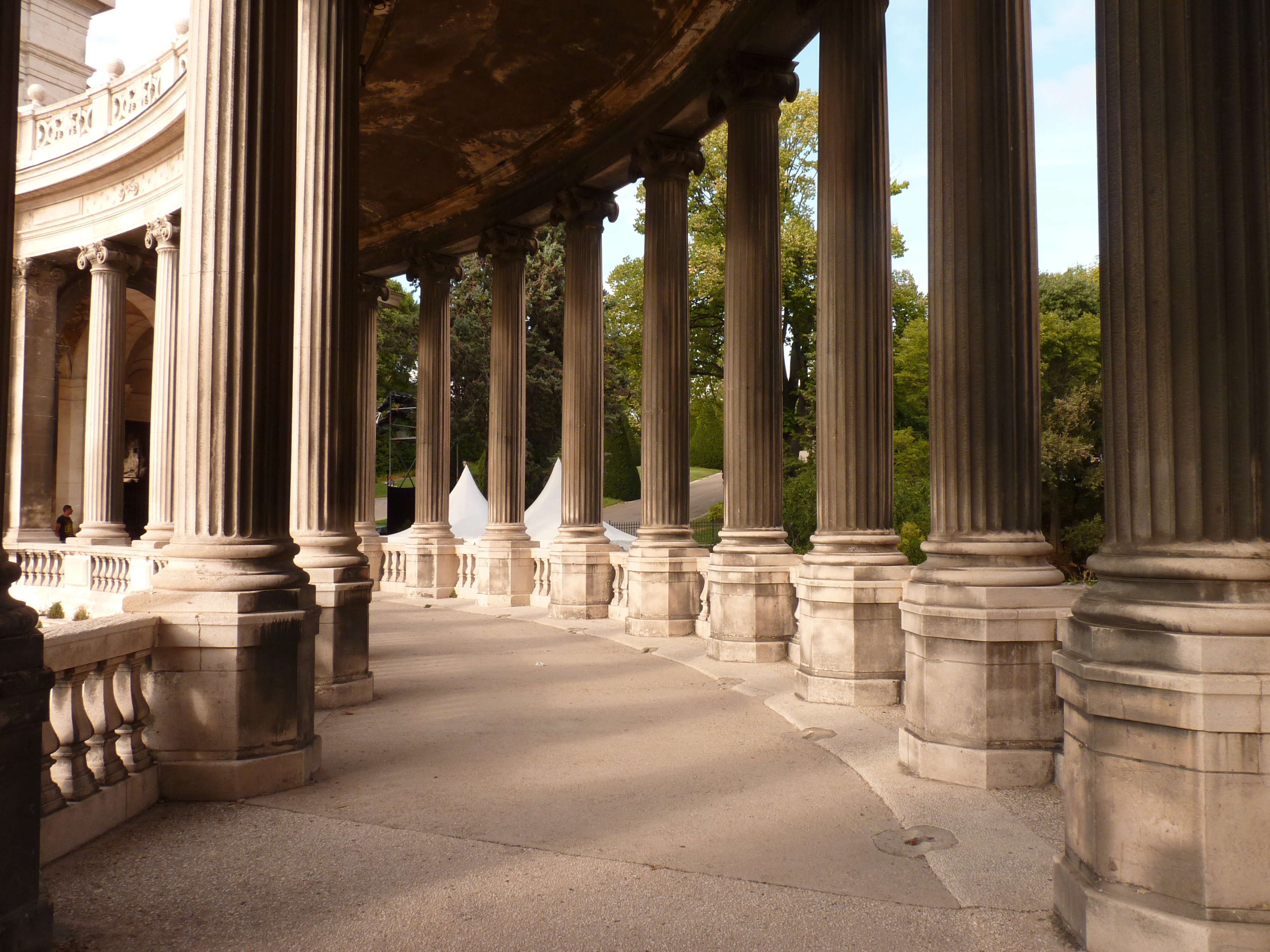 The famous colonnade that connects the main building with the wings at each side: the Natural History museum and the Fine Arts museum